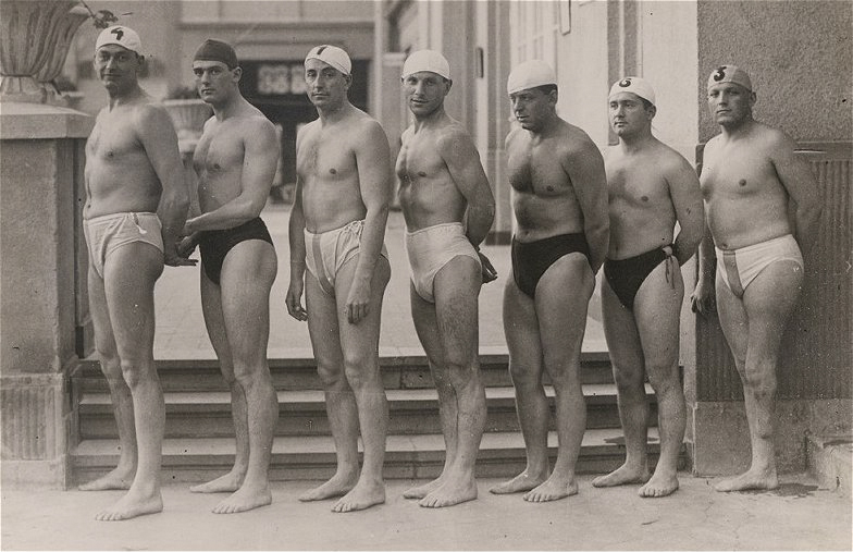 Az 1932. évi, Los Angelesben megrendezett X. nyári olimpia aranyérmes magyar vízilabda csapata (balról jobbra): Ivády Sándor, Bródy György, Vértesy (Vrábel) József, Németh János, Homonnai (Hlavacsek) Márton, Keserű Alajos, Halassy Olivér